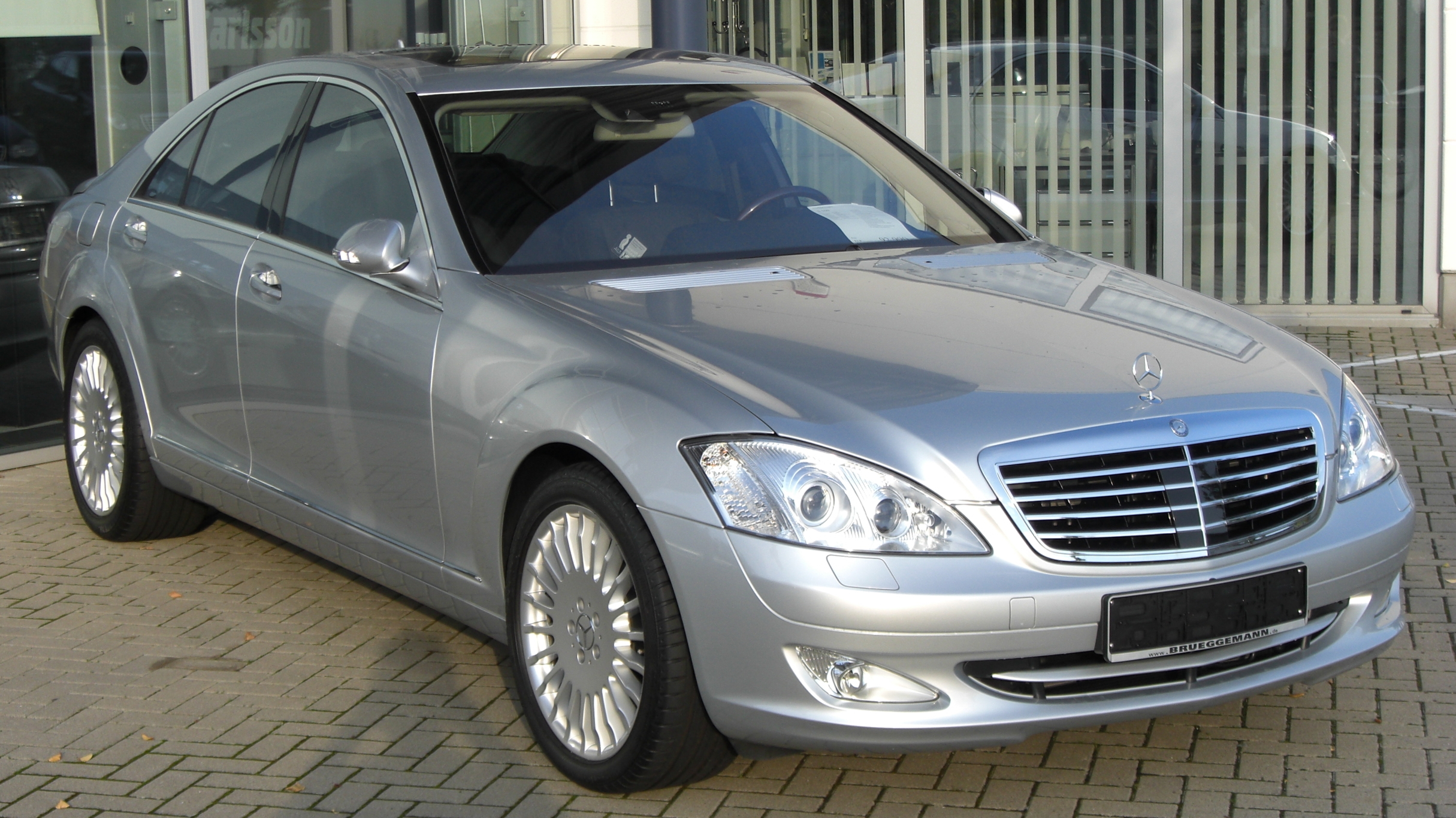 Mercedes S500 (W221)